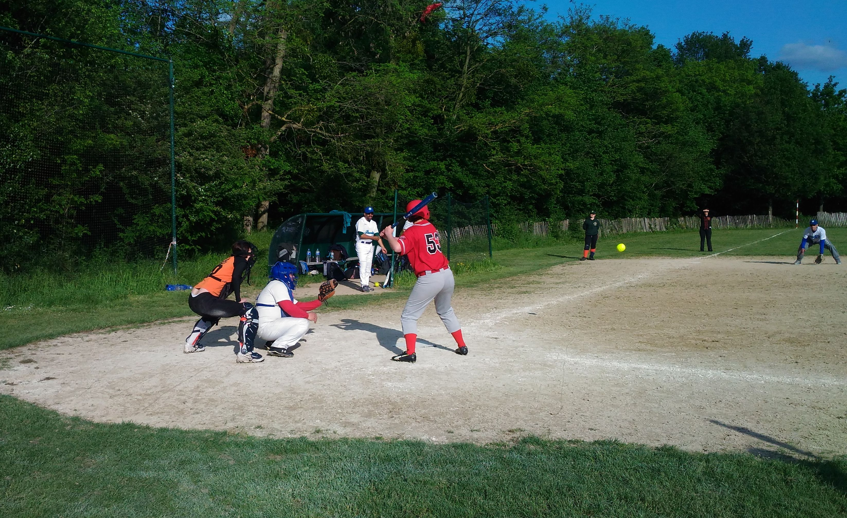 Match de softball : finale entre les Teddy bears de Cergy et les Bandits de Nogent-sur-Marne, plaine de jeux de Mortemart (bois de Vincennes, Paris). Passage à la batte des Teddy bears.